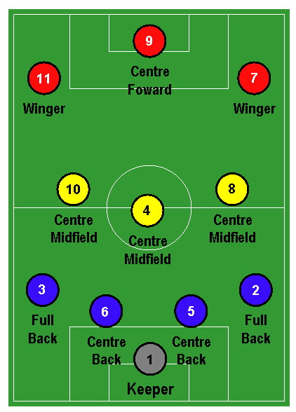 mia creazione